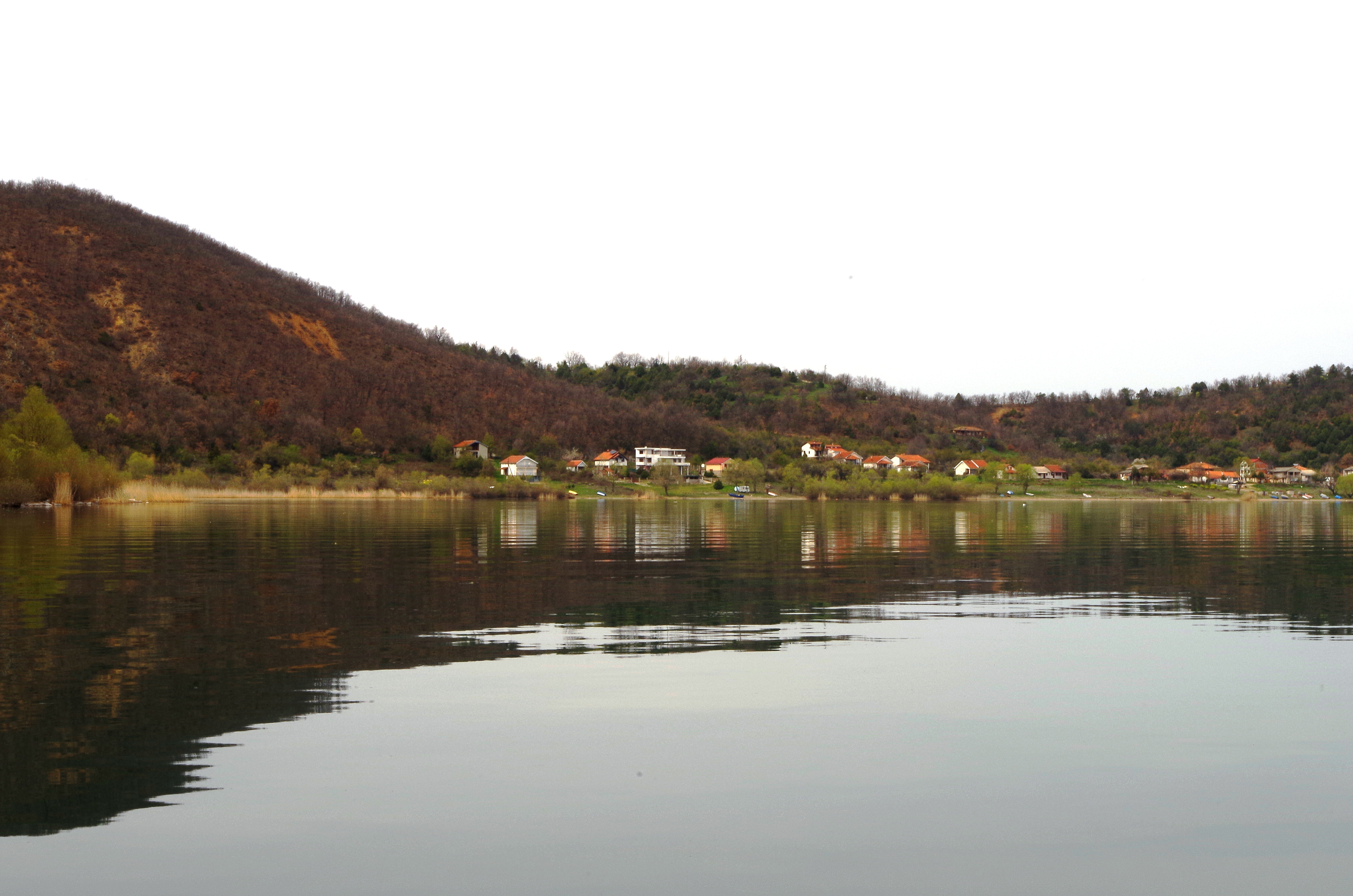 Поглед на селото Коњско од езерото